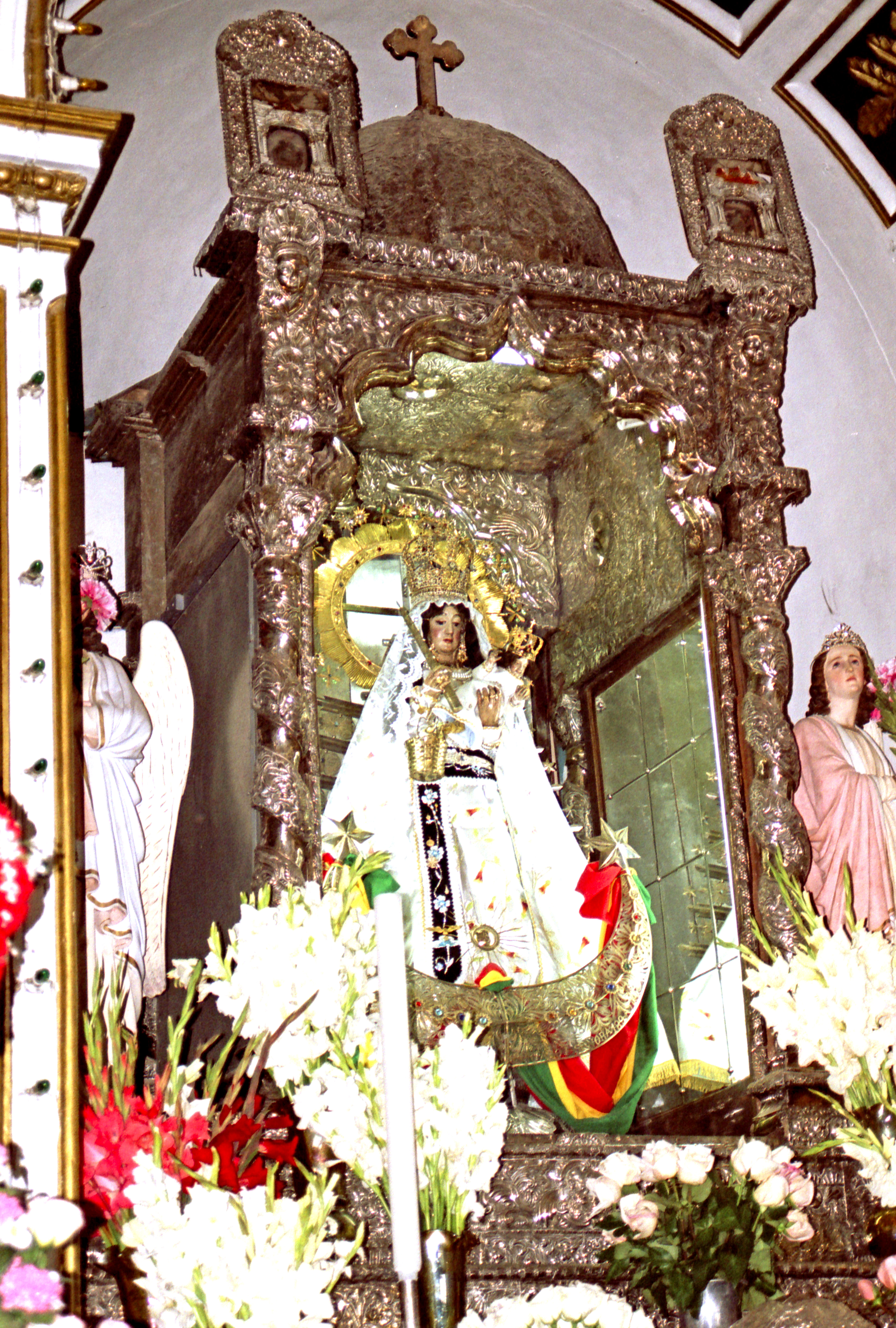 Bolivia-113